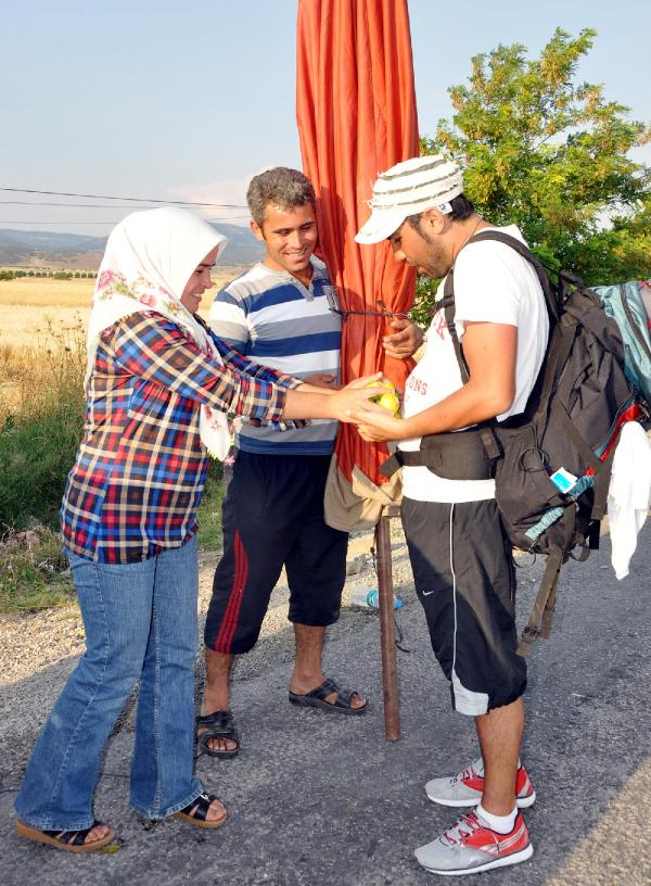 Adalet Yürüyüşü Keçiborlu'da